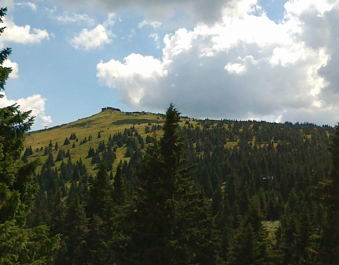 Widok na szczyt Petrovy kameny sprzed hotelu Barborka